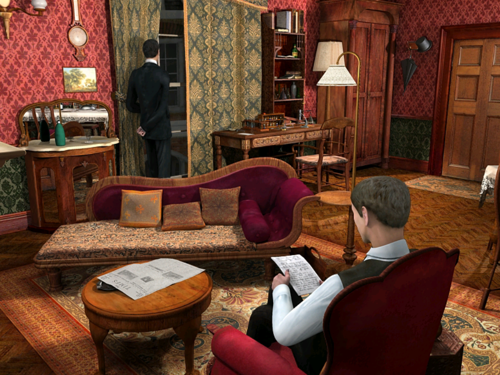 Capture d'écran du jeu Sherlock Holmes : La Boucle d'argent. Nous nous trouvons à Baker Street, lors de l'intro du jeu. Holmes regarde par la fenêtre, Watson est assis